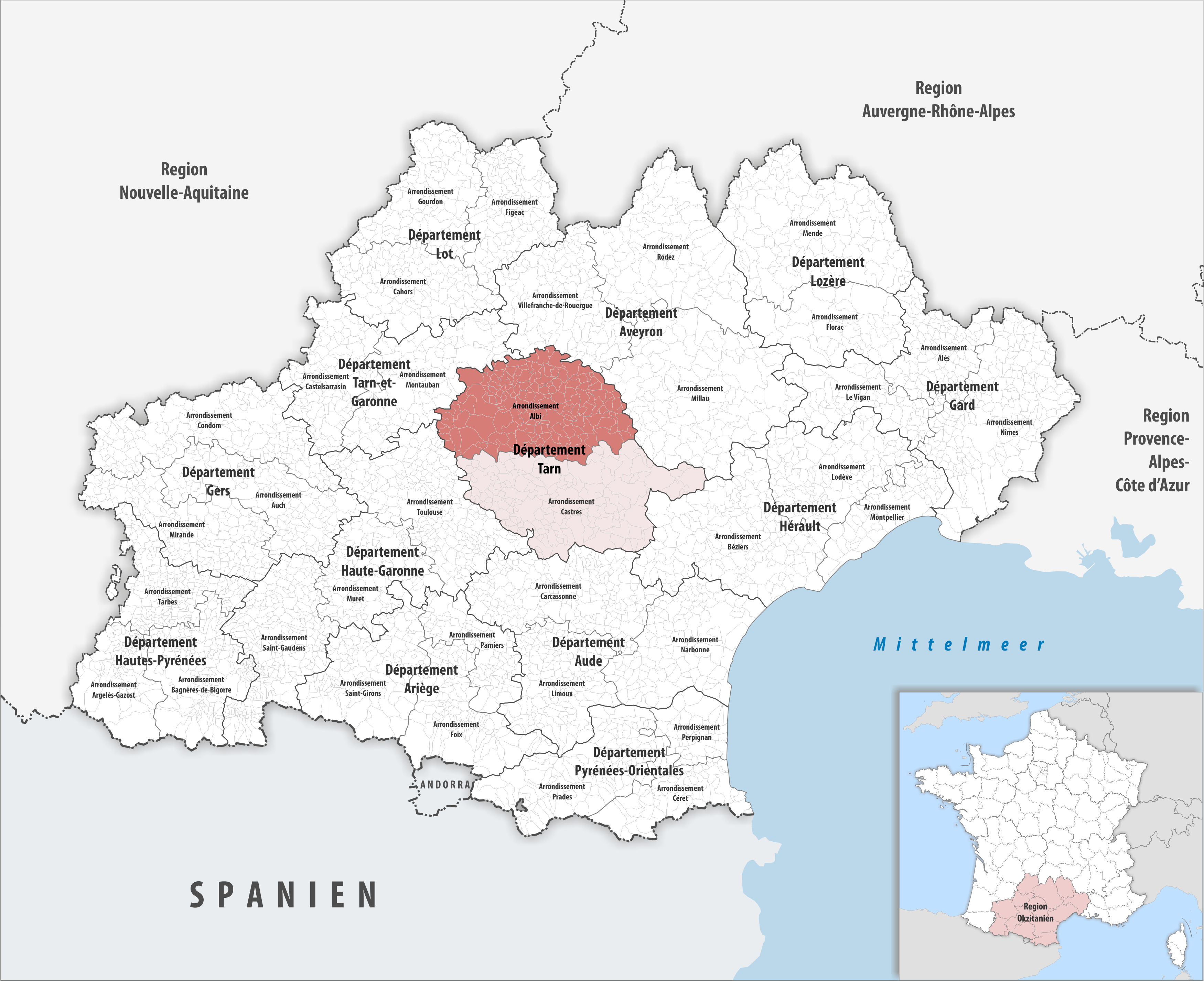 Lage des Arrondissements Albi